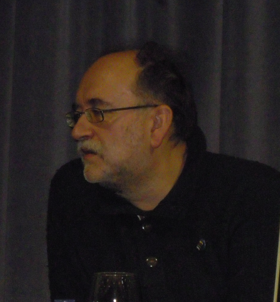 Carlos Taibo falando sobre o movemento 15-M en Pontevedra